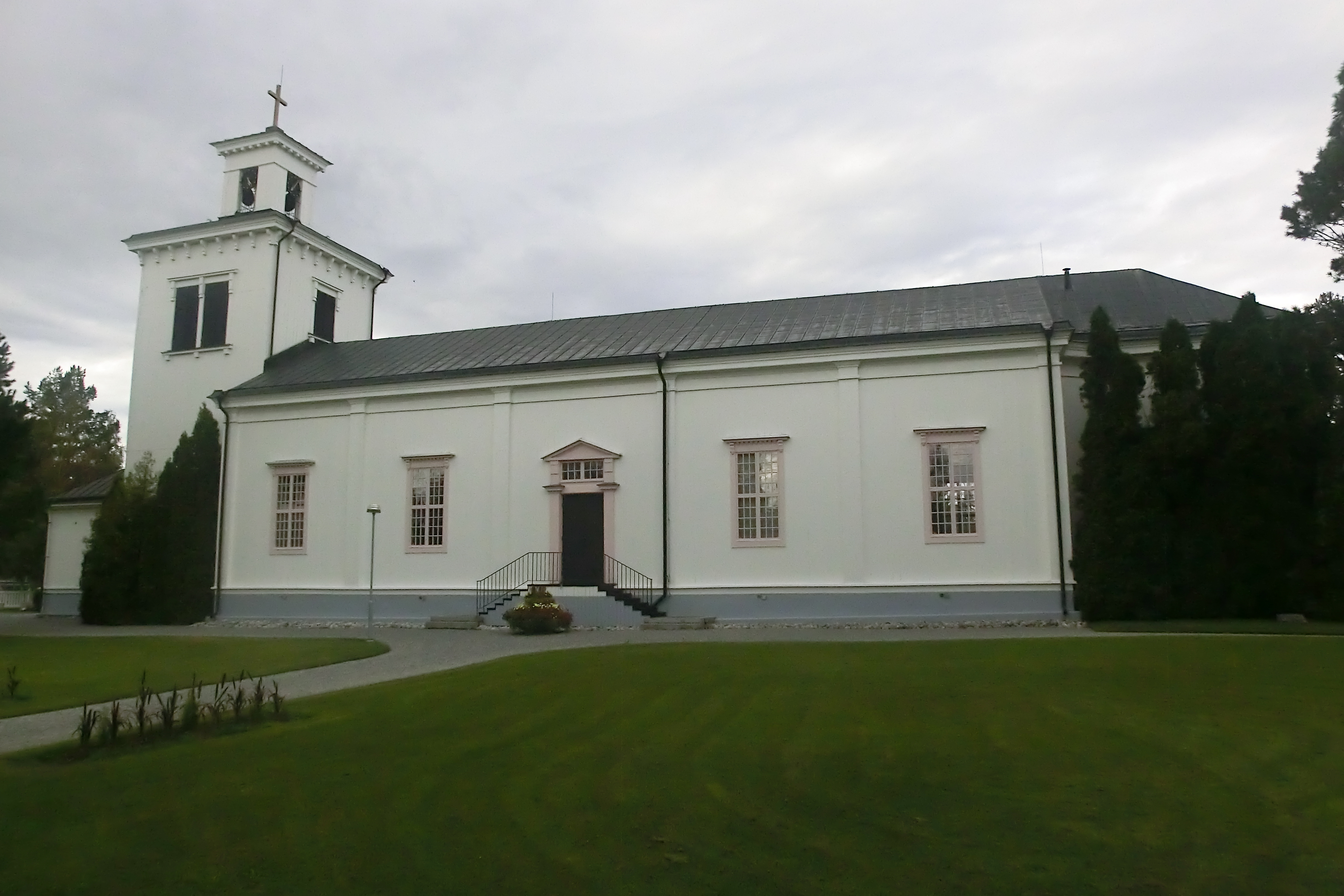 Mo kyrka